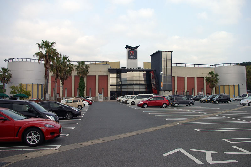 福岡県糟屋郡久山町トリアス久山に存在したTOHOシネマズトリアス久山